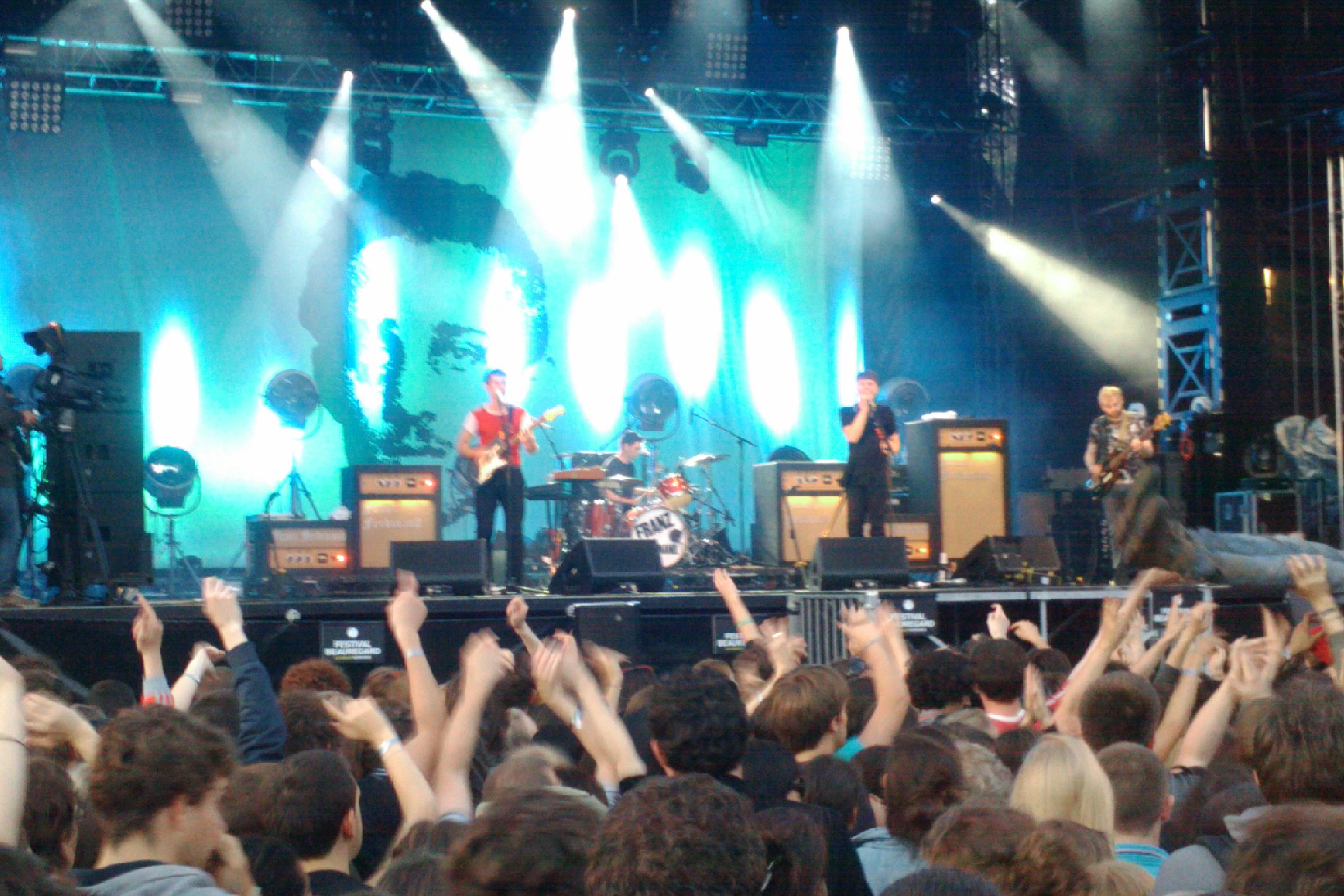 Festival Beauregard